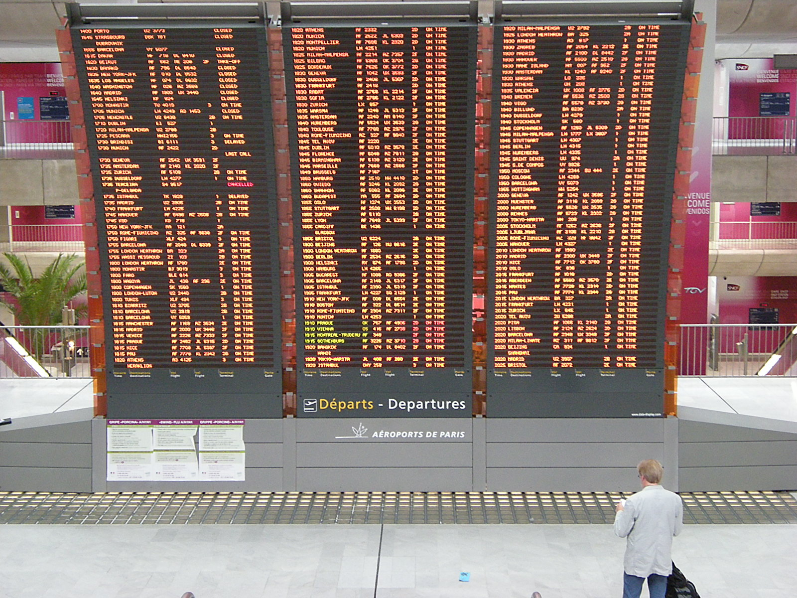 Aeroporto CDG, Paris